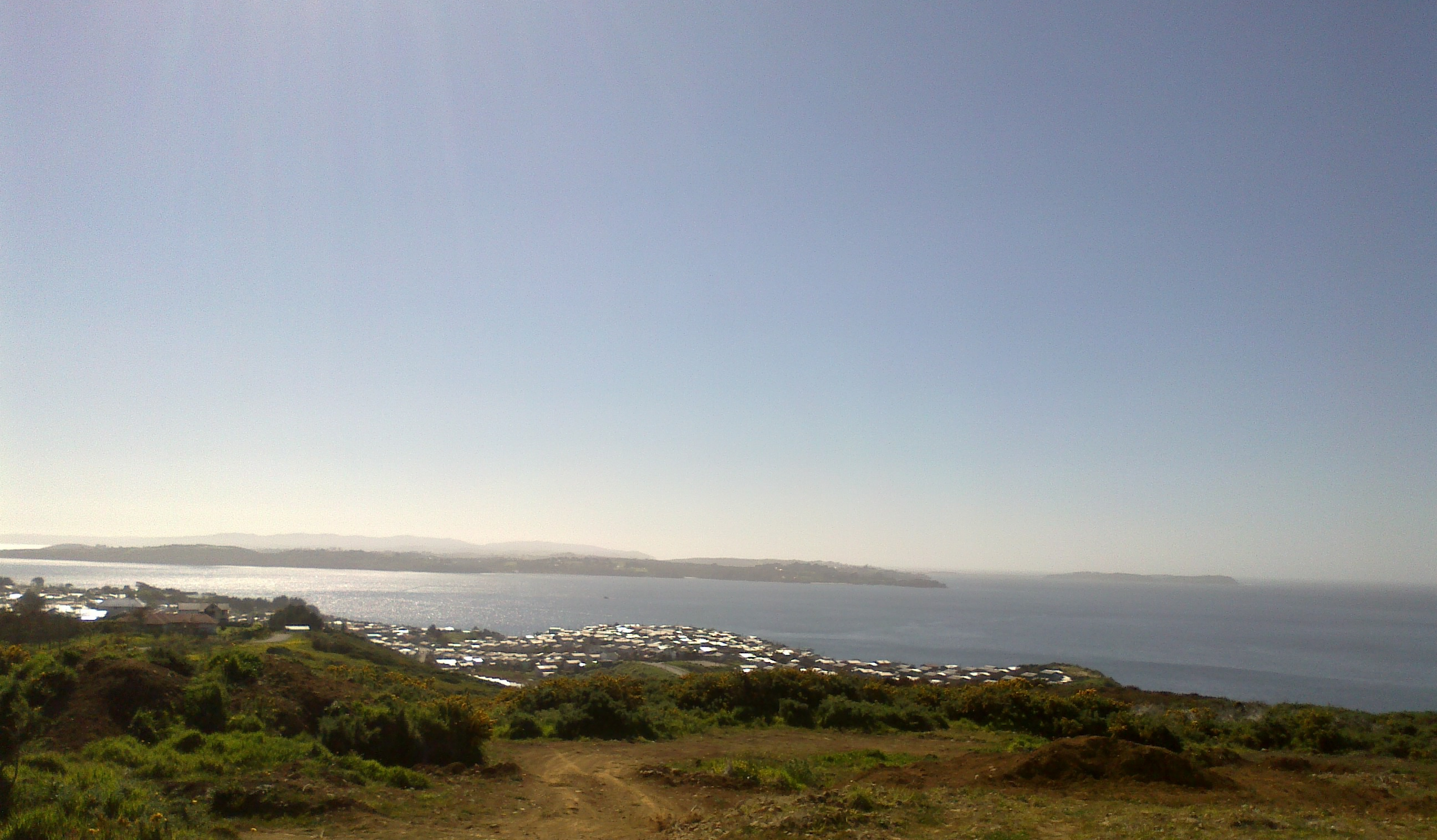 Parte de la ciudad de Ancud y de la península Lacuy, archipíélago de Chiloé, desde el cerro Huaihuén.